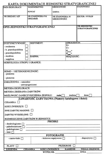 Karta dokumentacji jednostki stratygraficznej - strona 1